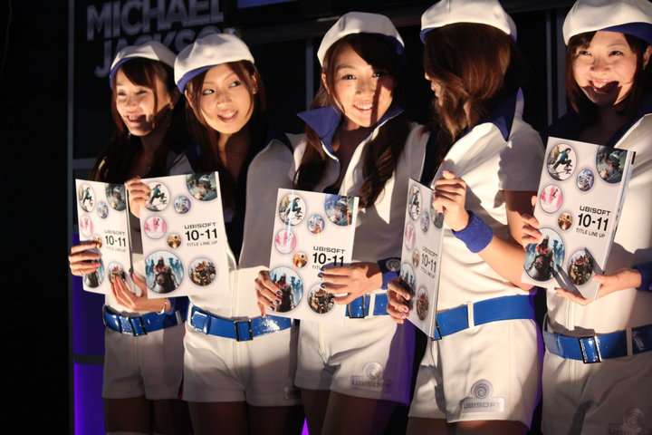 2010東京電玩展，Ubisoft攤位的宣傳模特兒。左起：青依、松本麻實、春那美希、ますあや、高梨まり。